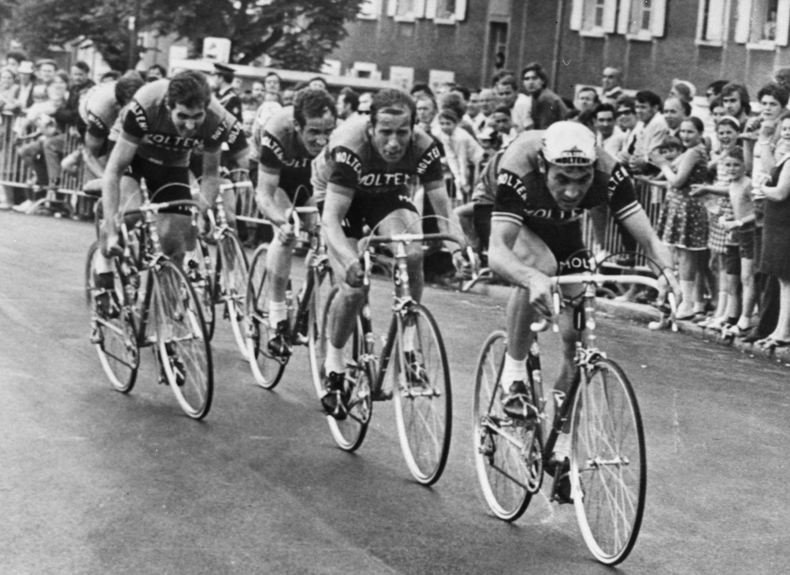 Tour de France , 1e etappe, Molteni ploeg op kop, Eddy Merckx , 2e van links Rini Wagtmans in actie.